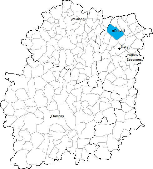 Carte de localisation du canton de Draveil en Essonne (91)